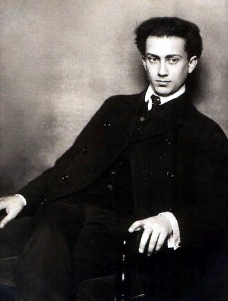 Foto des österr. Musikers Gottfried Galston von Nicola Perscheid.